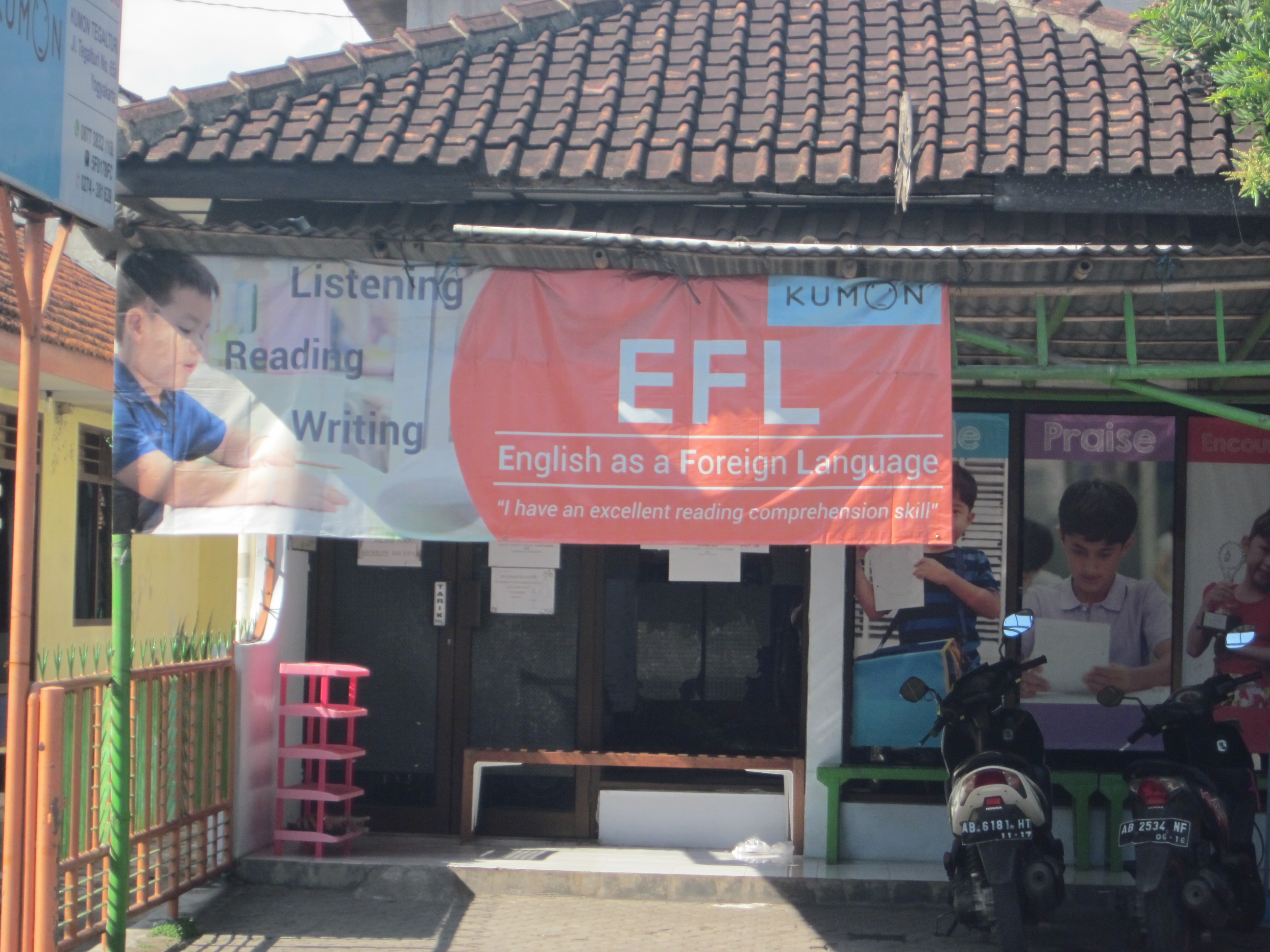 Salah satu kelas Kumon di Yogyakarta.